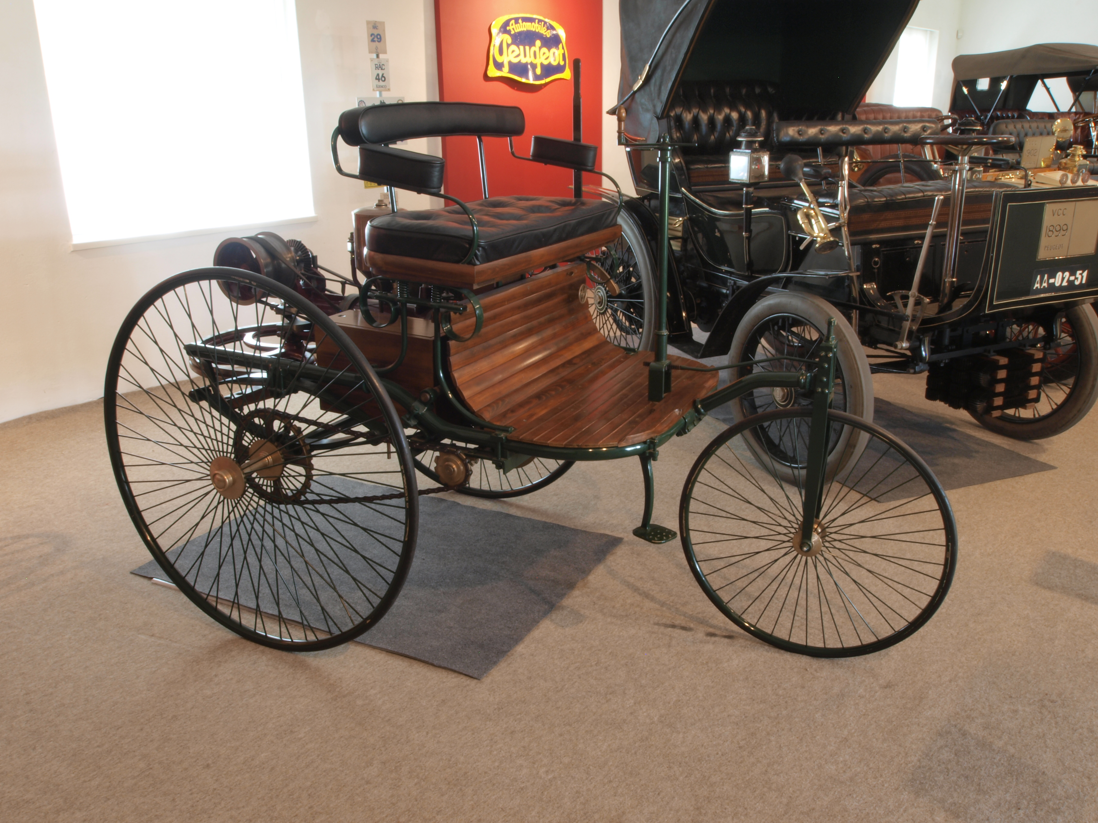 Photographed at the Caramulo museum, 'Museu do Caramulo', Caramulo, Portugal. OLYMPUS DIGITAL CAMERA